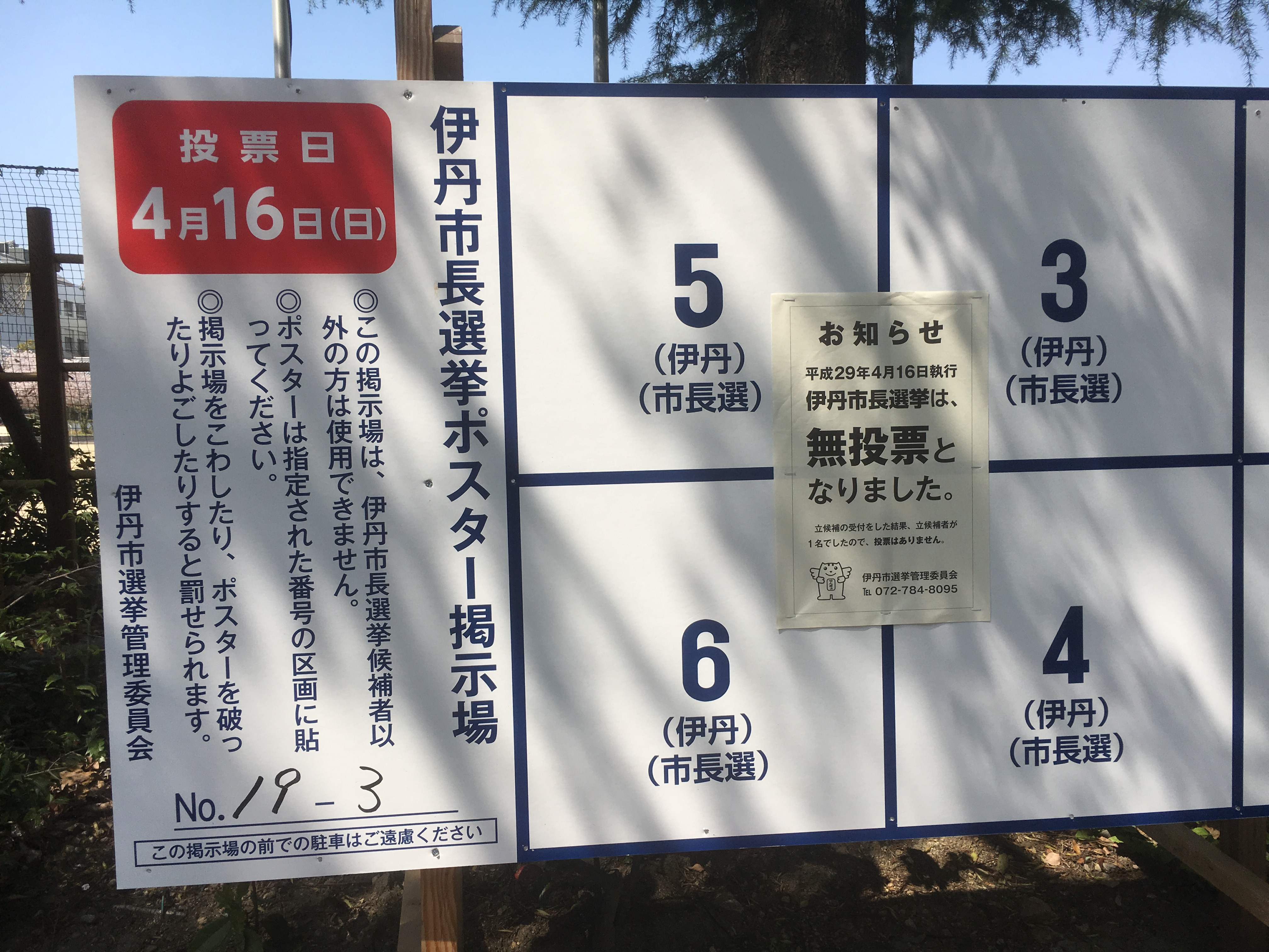 2017年の伊丹市長選挙が無投票となったことを告知する掲示